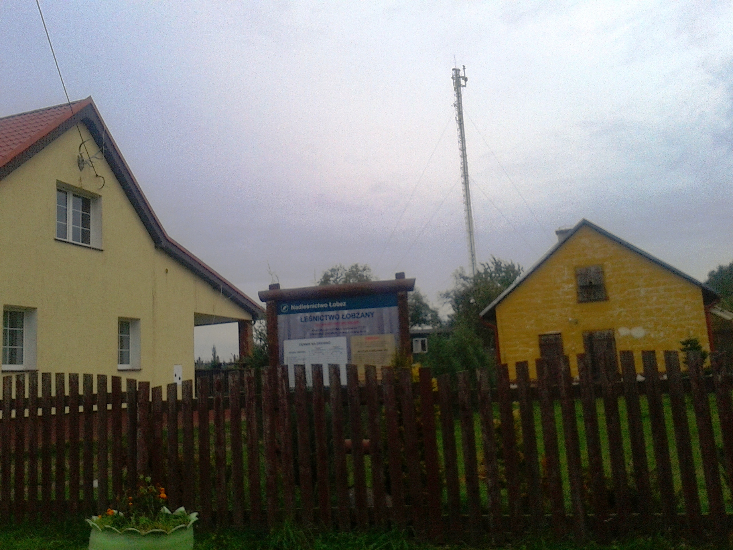 Łobżany 7